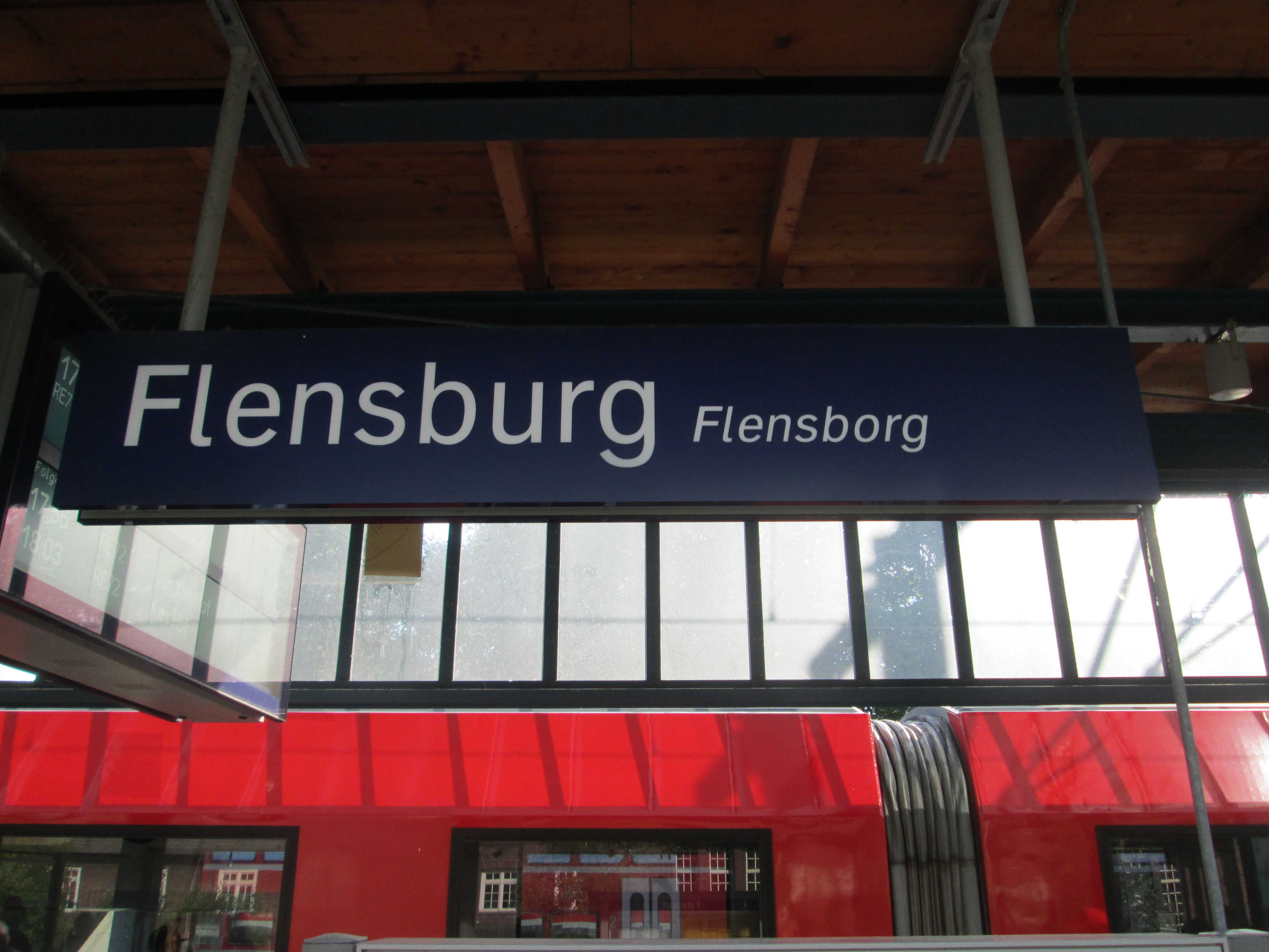 Tosproget baneskilt i Flensborg